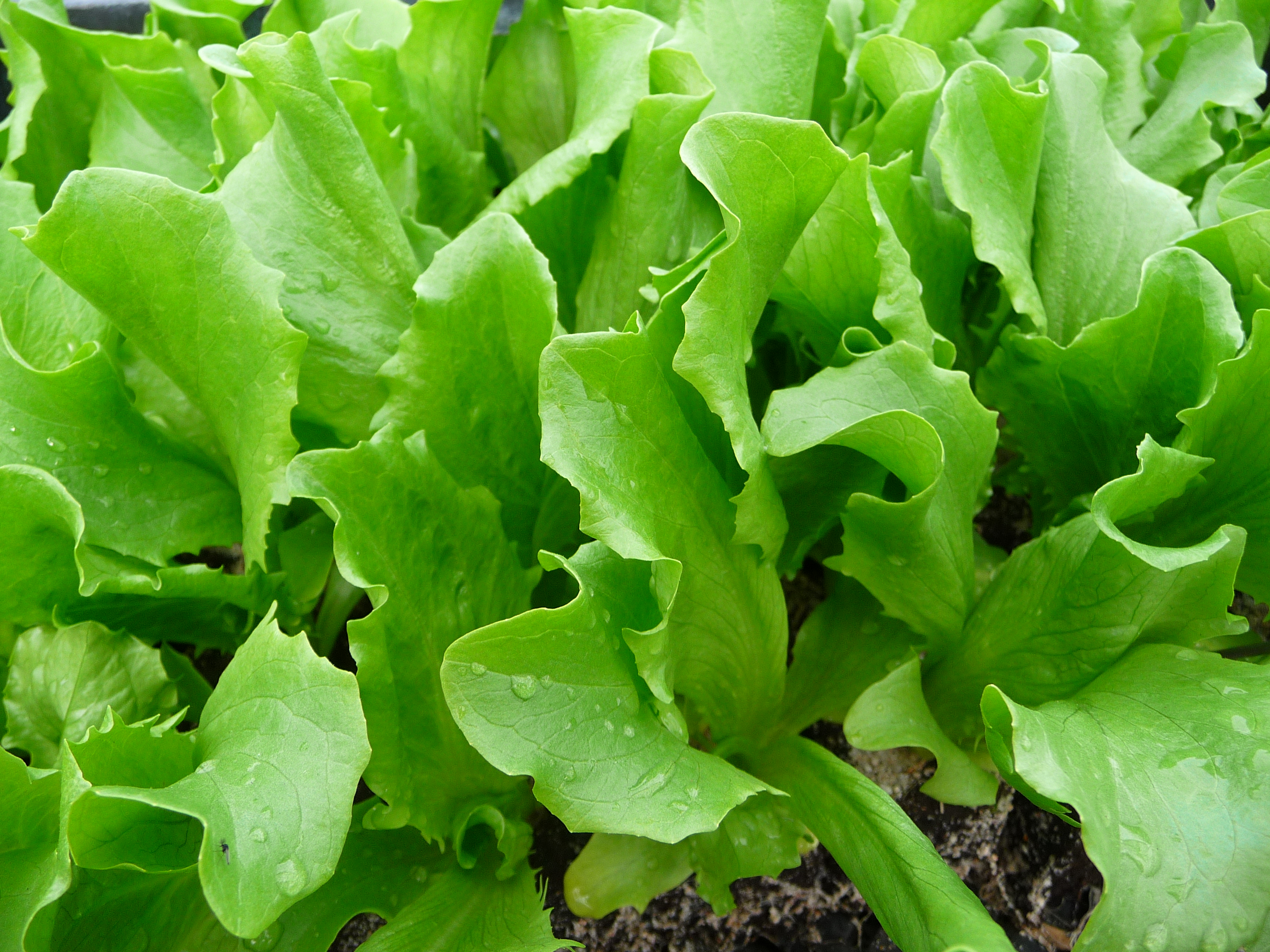 Setzlinge Eisbergsalat (Lactuca sativa), fotografiert in Deutschland)